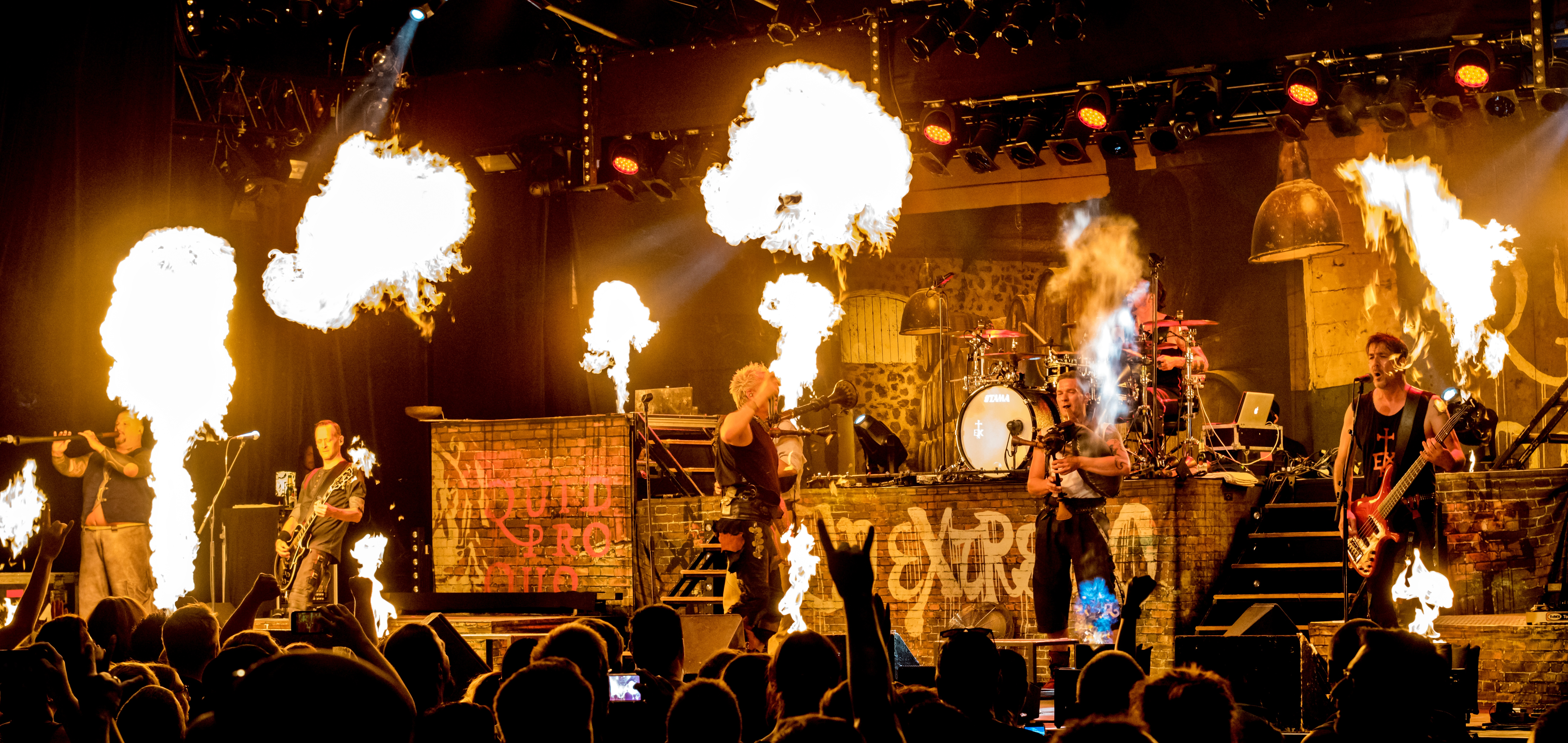 Bilder vom Zelt Musik Festival 2018 in Freiburg im Breisgau In Extremo am 29.07.2018 im Zirkuszelt